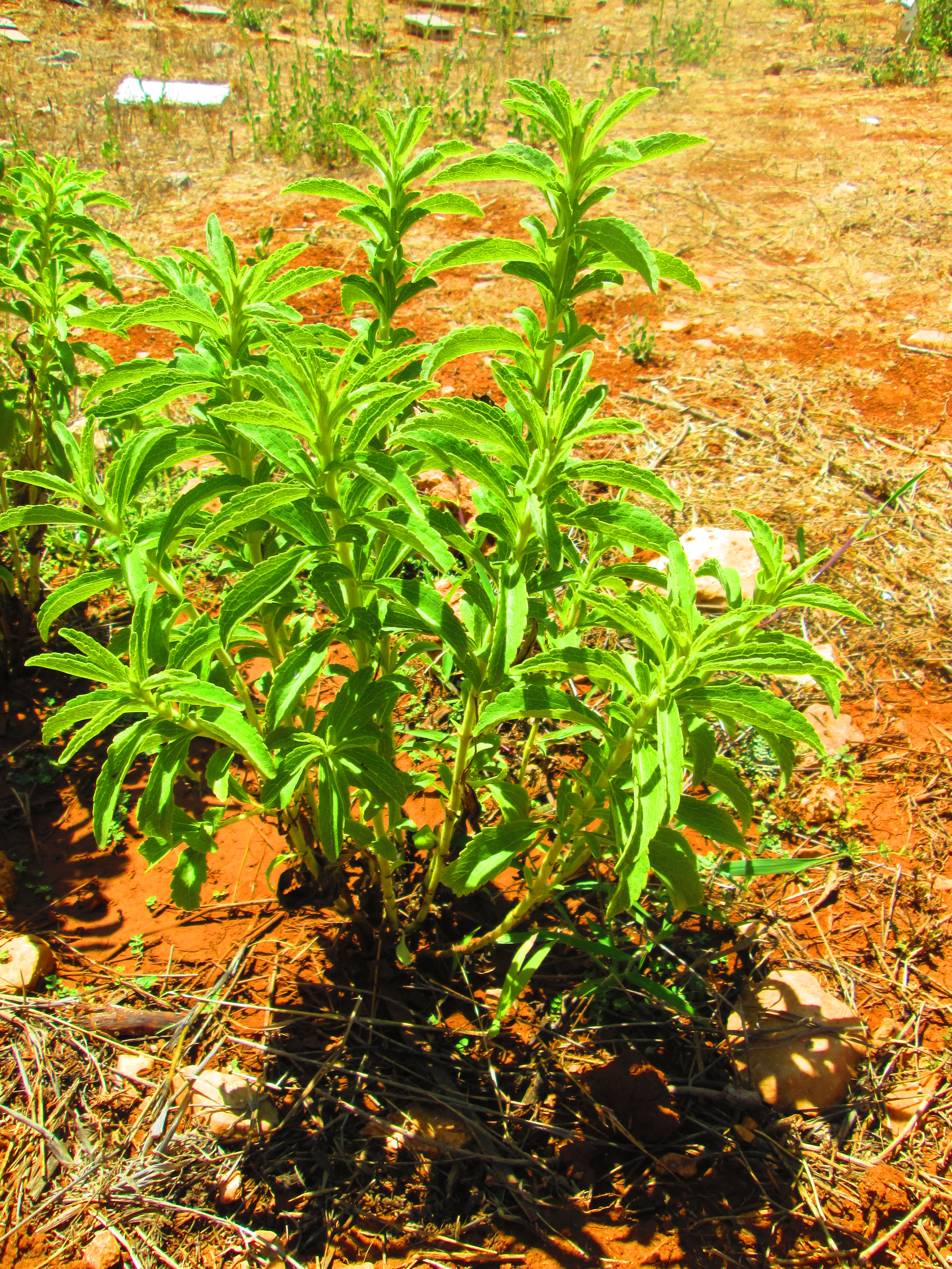 שתיל סטיביה